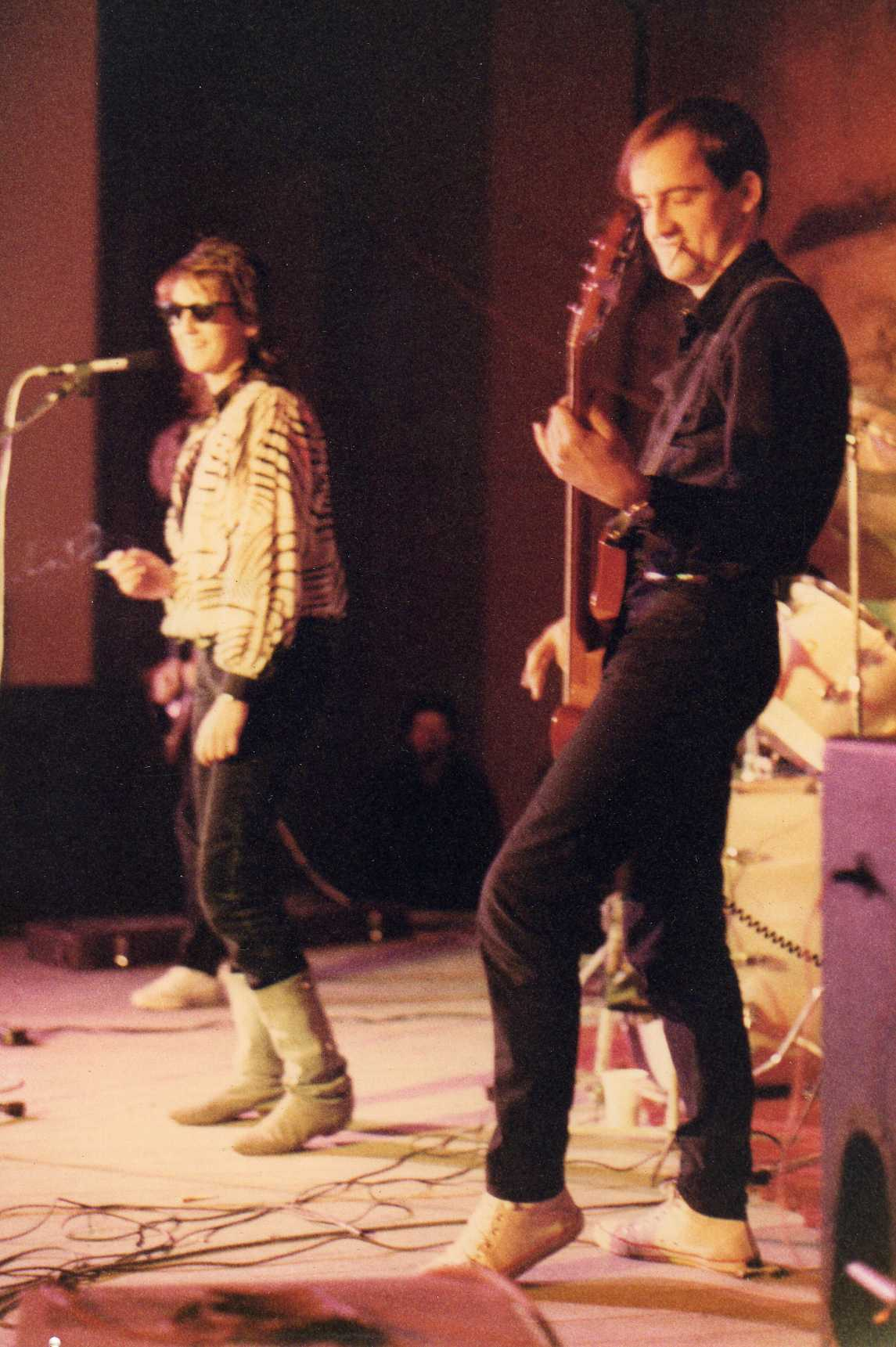 Detectors, Grup de Rock Catala